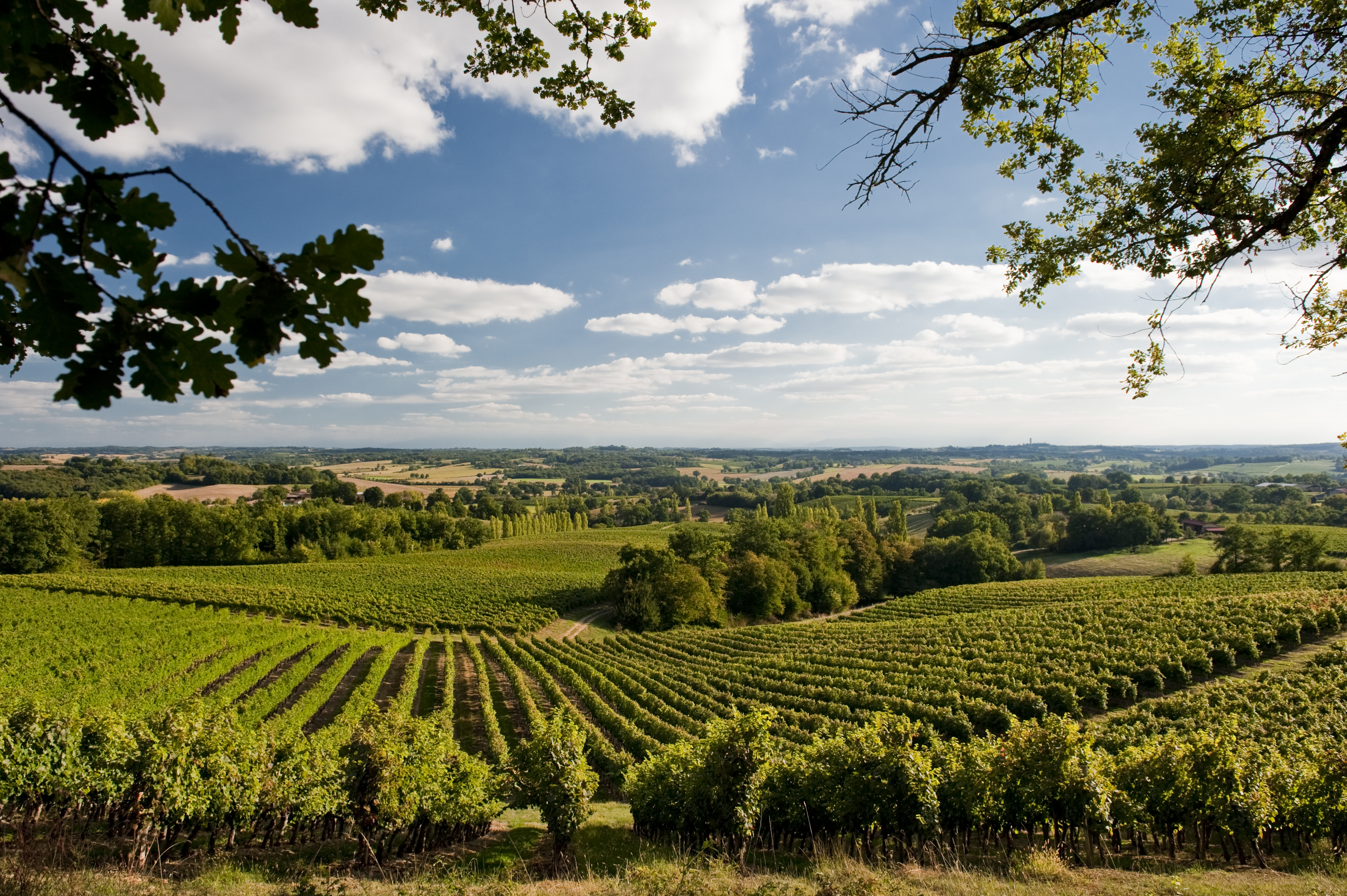 Paysage de vignes vallonnées typique en Gascogne